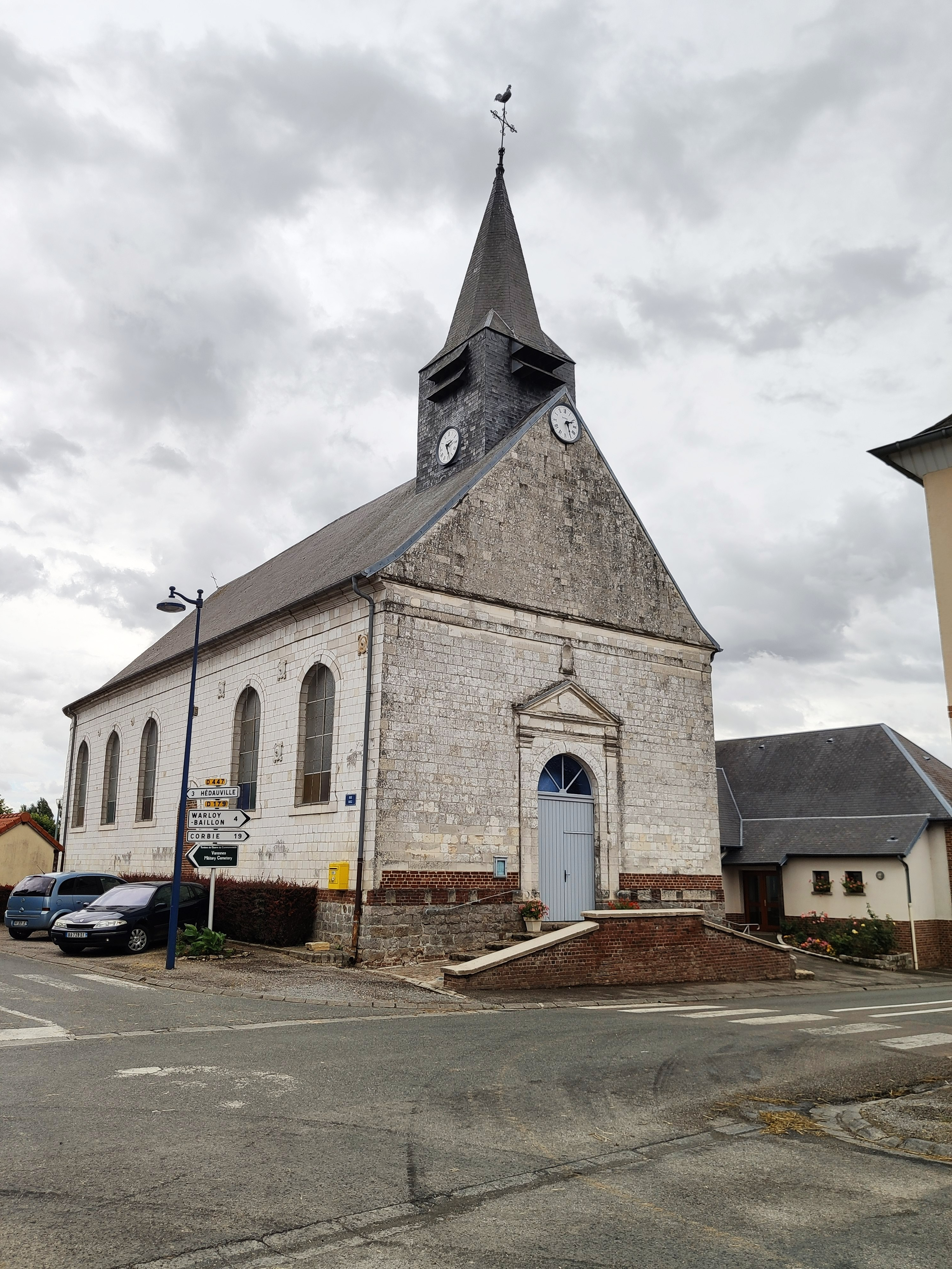 Varennes (Somme) : L'église Notre-Dame-de-l'Assomption